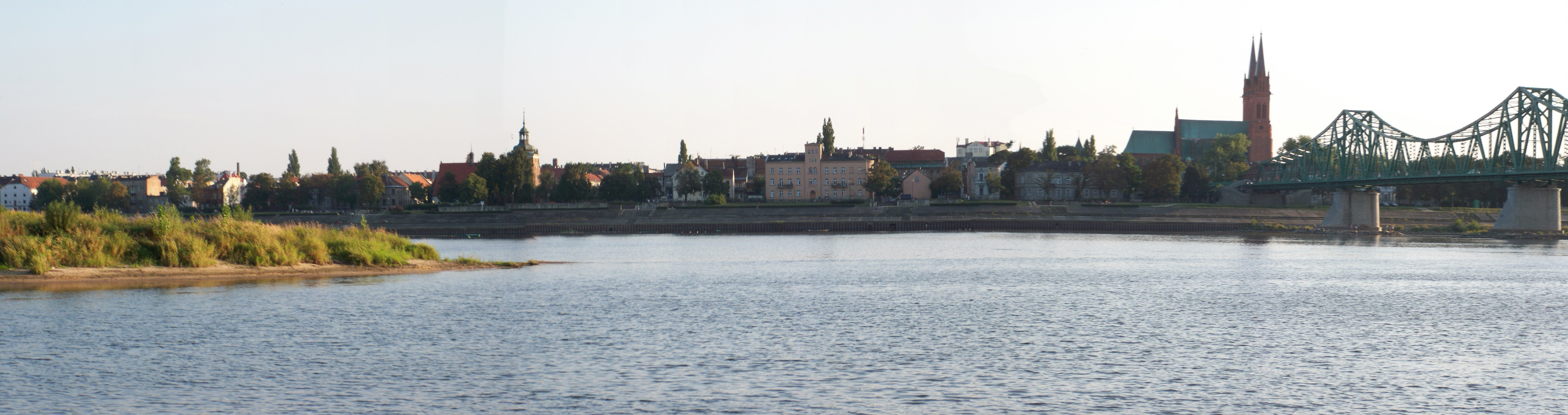 Wisła we Włocławku (2009 r.)